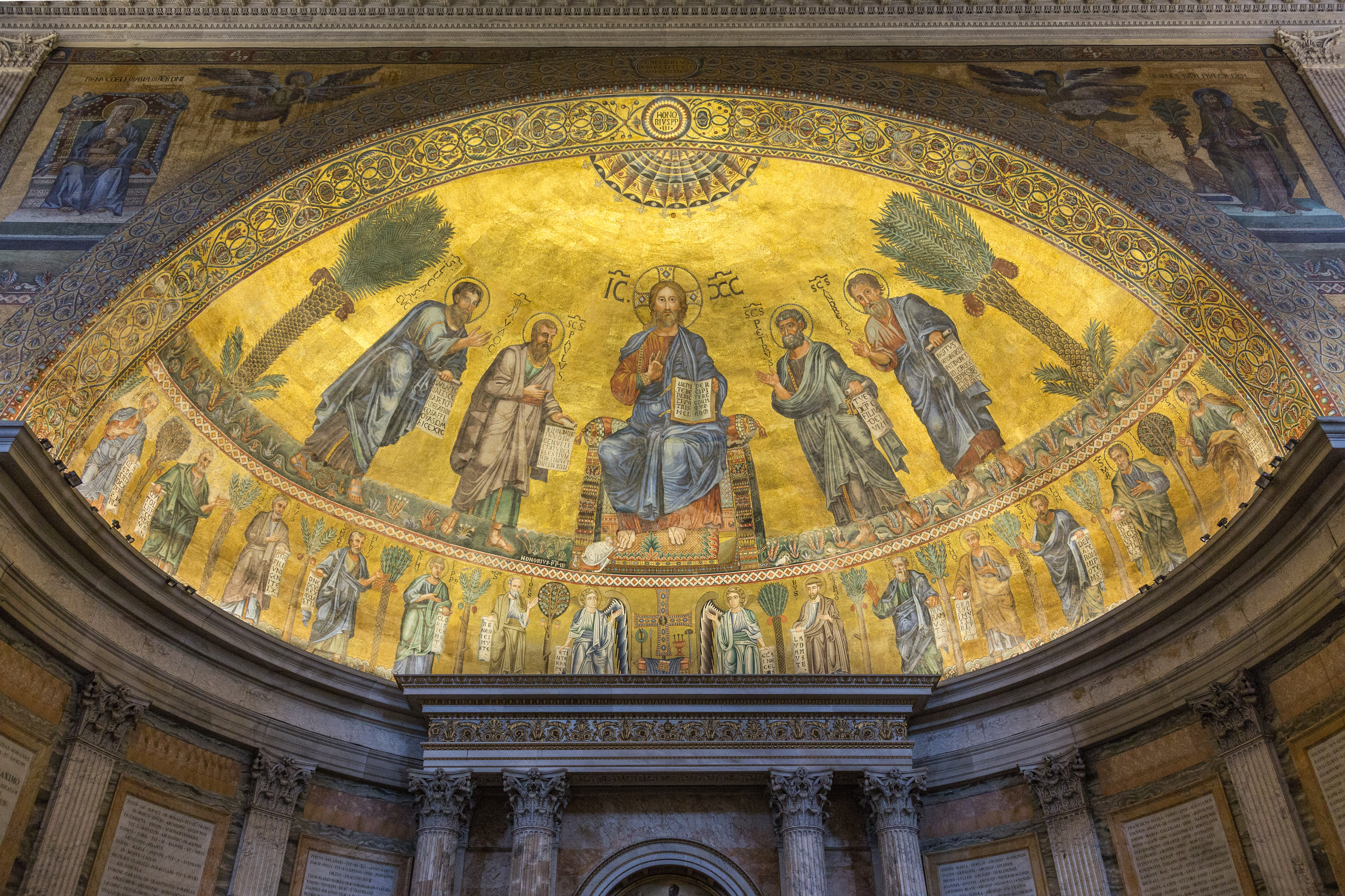 Das Apsis-Mosaik der San Paolo furi le mura in Rom stammt aus dem 13. Jh. Papst Honorius III. (am rechten Fuß Chrisi abgebildet) gab das Mosaik 1220 bei venezianischen Künstlern in Auftrag.